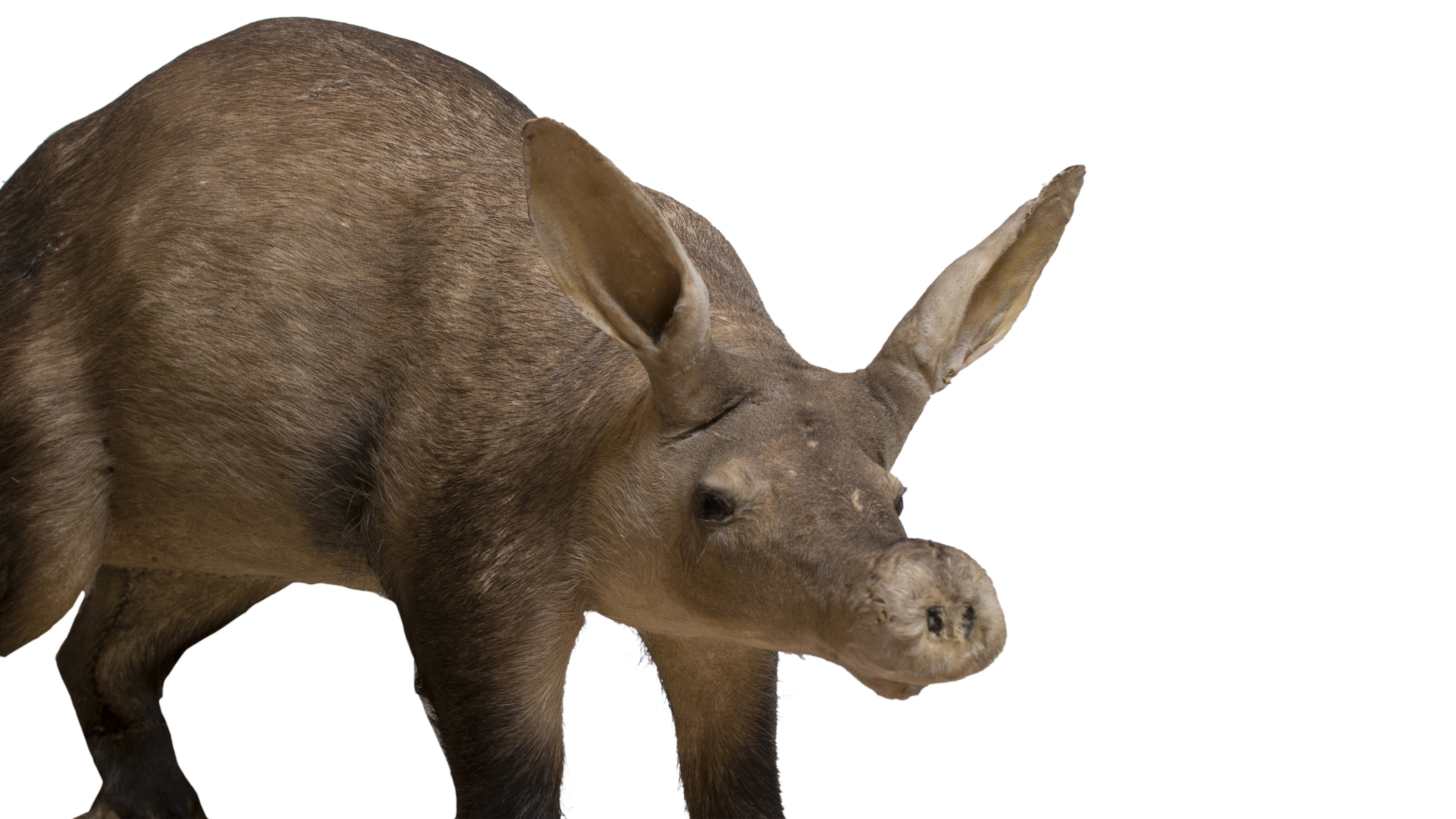 Oritteropo. Tassidermia.